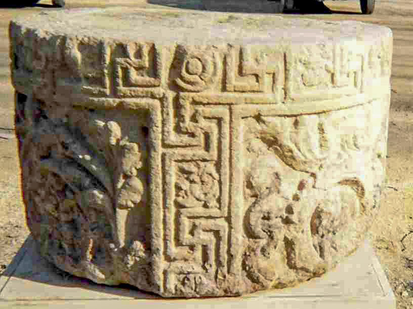 fragment de colonne gallo-romaine d'un monument inconnu de Caesarodunum (Tours)